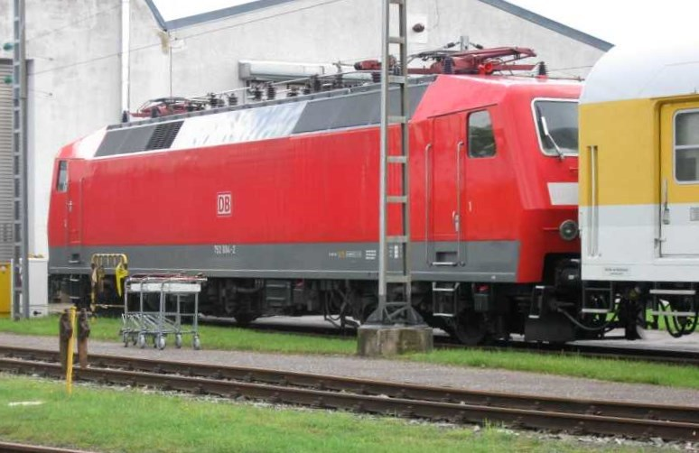 DBAG 752 004, die ehemalige 120 004, im BZA München